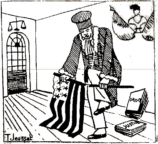 caricature visant l'interdiction du drapeau Gwen ha Du lors d'une manifestation du Parti autonomiste breton. La légende indique : "la Cour de cassation vient de rejeter le pourvois formé par les manifestants condamnés l'an dernier pour avoir déployé le drapeau breton au congrès de Chateaulin."